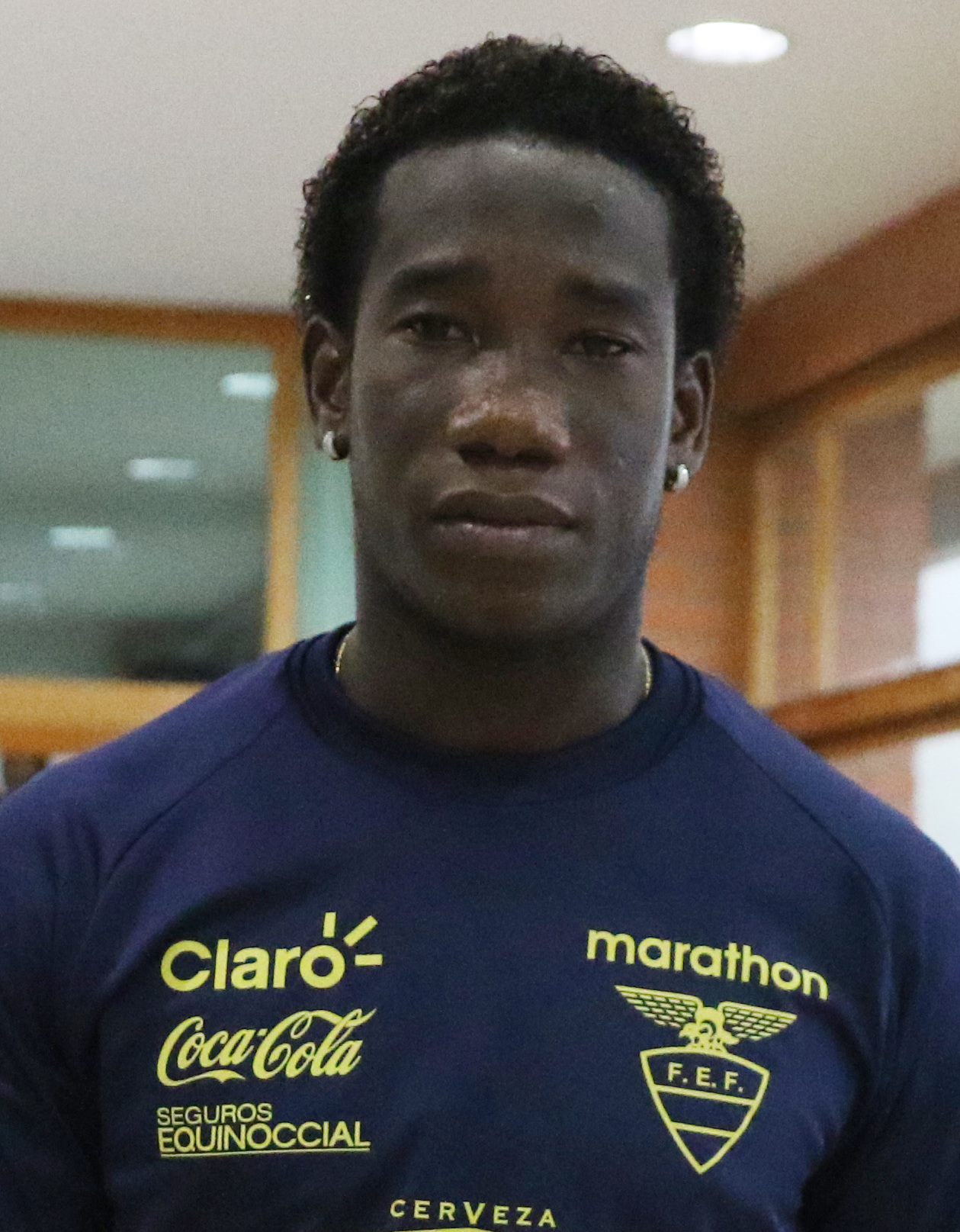 Quito, 24 de marzo de 2017 (Andes).- Luis Caicedo, seleccionado de la Tricolor hace un análisis de lo que será el partido frente a Colombia el próximo martes 28 de marzo en el estadio Olímpico Atahualpa. ANDES/Micaela Ayala V.